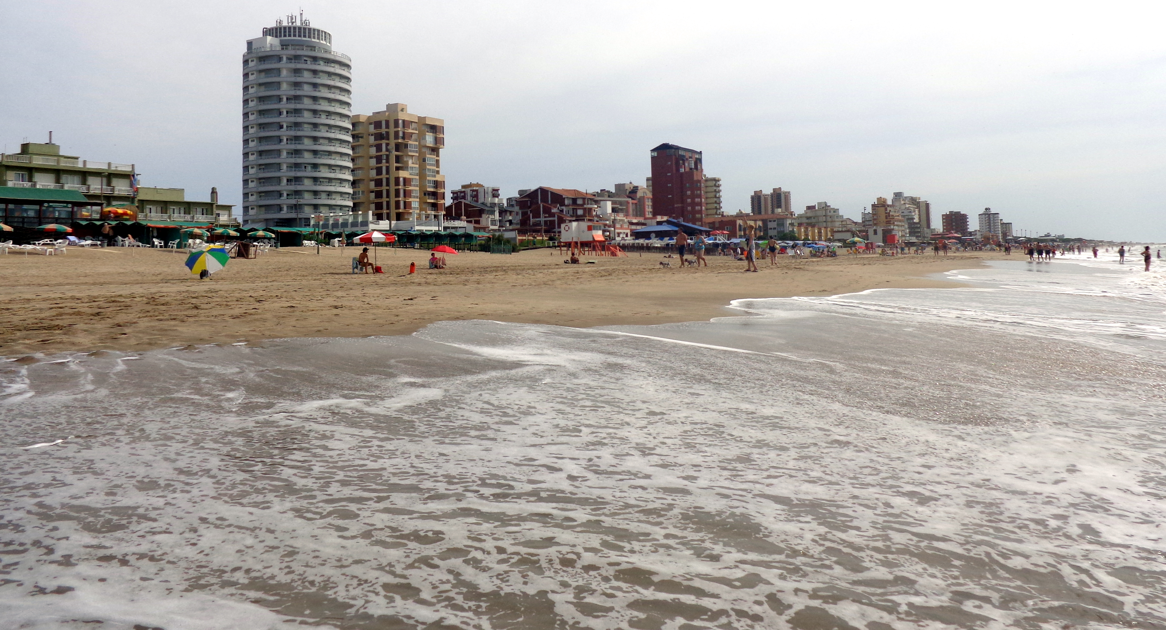 Costa de Villa Gesell, Provincia de Buenos Aires, Argentina. El Hotel Coliseo (el redondo) se ve a la izquierda.